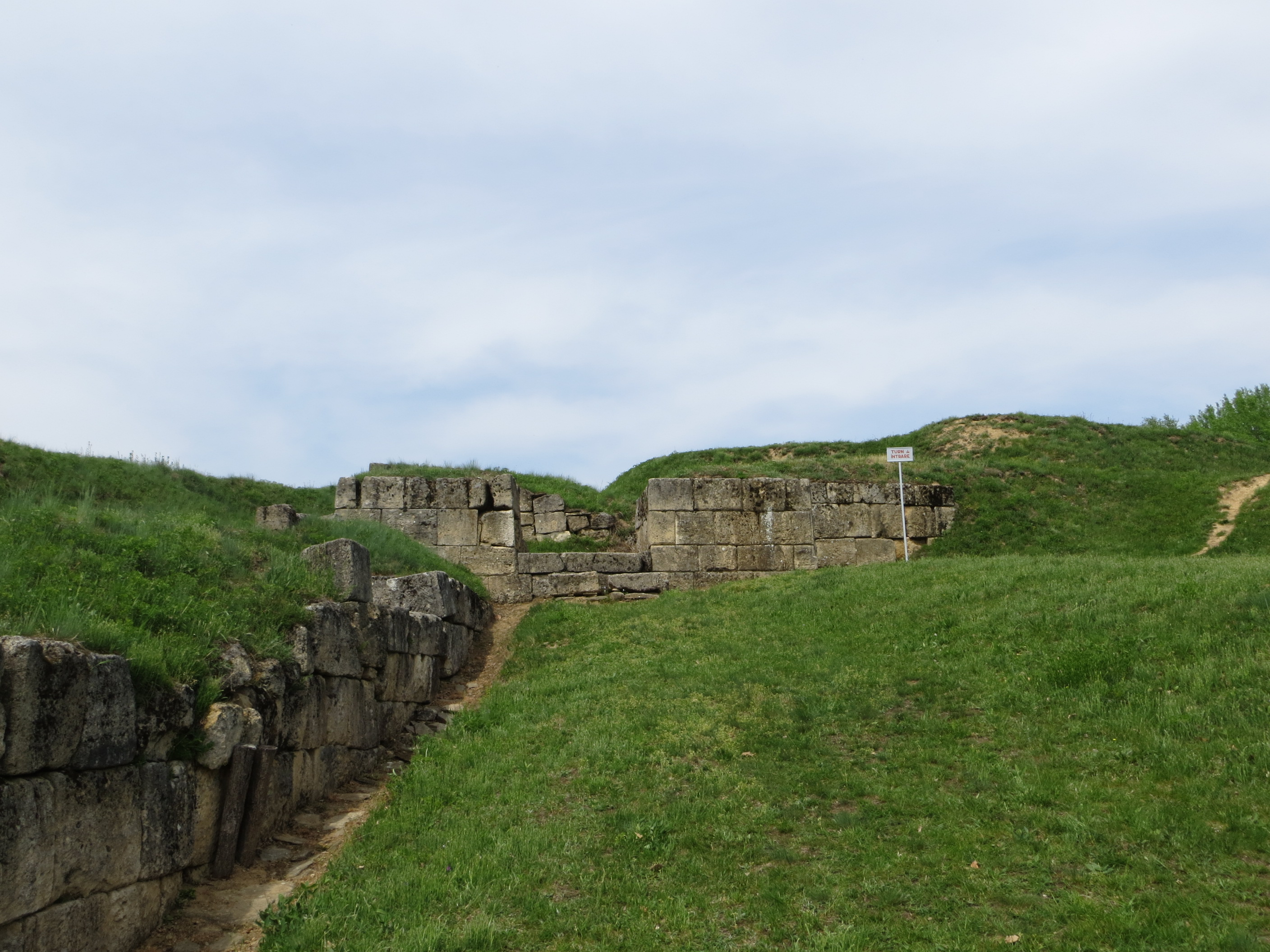 Fortificația de la Blidaru 01